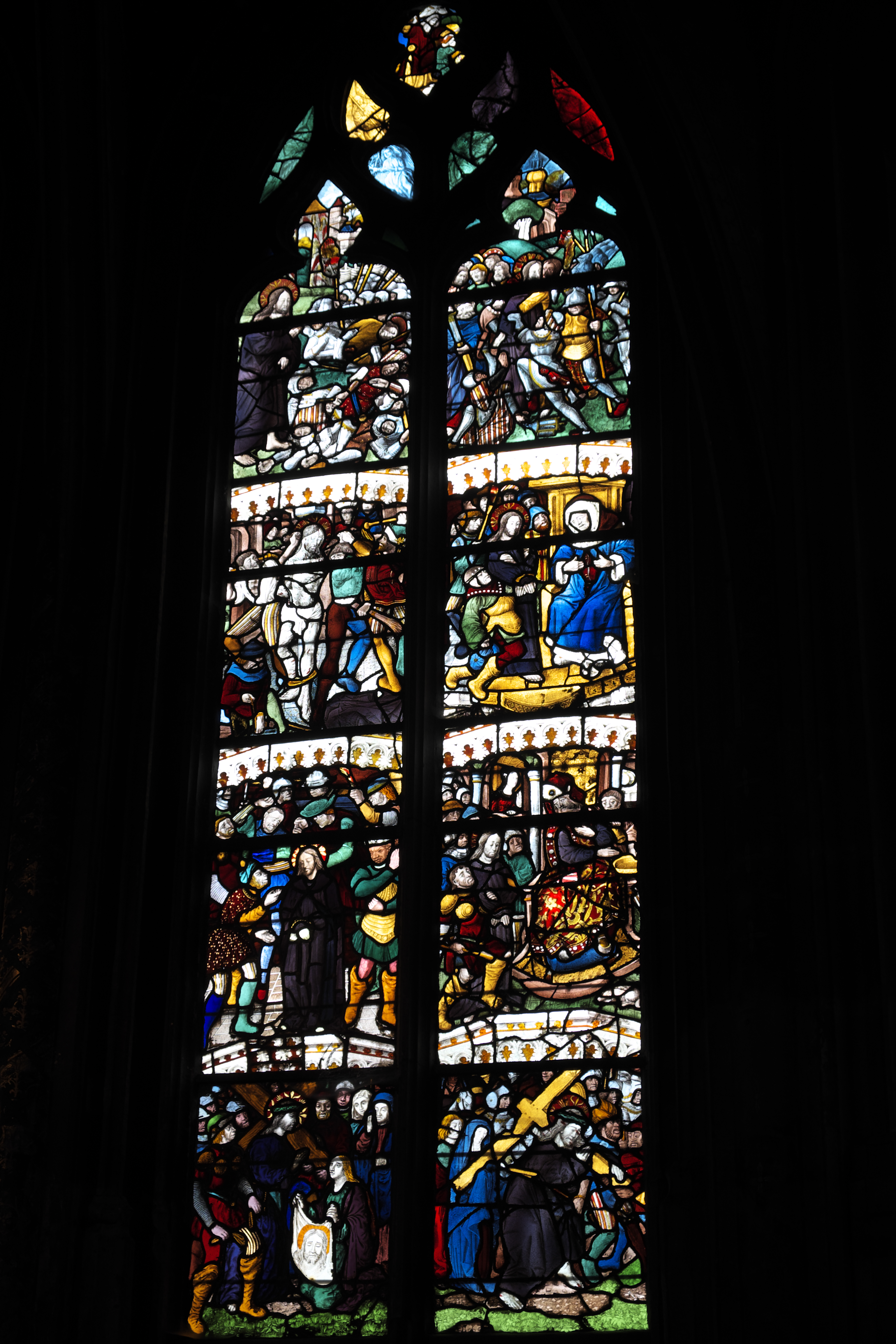 Katholische Kirche Saint-Pierre in Dreux im Département Eure-et-Loir (Centre-Val de Loire/Frankreich), Bleiglasfenster (baie 2) aus dem frühen 16. Jahrhundert im Chor; Darstellung: Passion